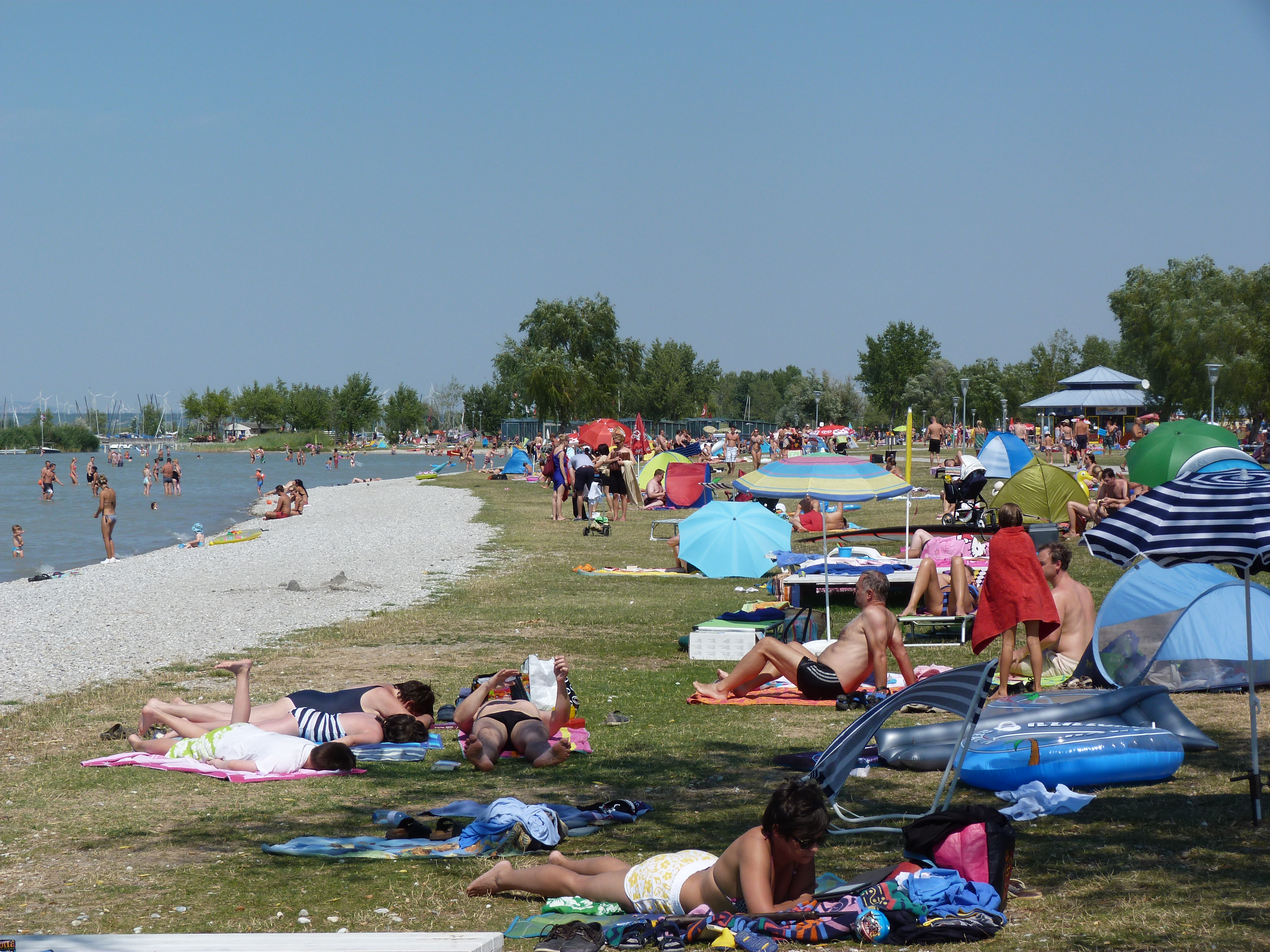 A felvételek 2013. Augusztus 18 –án, vasárnap készültek Pátfalun, a Fertő tónál. (Podersdorf am See, 1920 –ig Moson vármegye Nezsideri járásához tartozott). Pátfalu a Fertő tó vidékének fő üdülőközpontja, jelenleg itt található a leghosszabb strand. A pátfalui strand Mosonmagyaróvárról megközelíthető a Mosonmagyaróvár – Mosonszolnok – Albertkázmérpuszta (határ) - Gálos – Pátfalu útvonalon. Ezen az Alberkázmérpuszta előtti 8 – 10 km-es útszakasz viszonylag gyengébb, de kocsival is járható. A Knoll hajójárat (Schifffahrt Knoll) 14.30 kor indult a világítótoronytól. A mintegy 1 órás hajóút Pátfalutól a szemközti partig (Ruszt, kiszállás nélkül) majd innen délre a magyar határhoz, végül vissza Pálfalvába a Fertő tó keleti oldalán vezet. Egy felnőtt jegy az utazásra 6 EUR. Forrás: schiffffahrt-knoll.at Zentrumplatz Mole Mobil +43 (0) 664/1317939 ©© Derzsi Elekes Andor, Budapest, 2013, You are authorised to use these photos and vids under Creative Commons – even for commercial, for profit purposes. Photos must be attributed to Derzsi Elekes Andor. All of the photos and vids in the Metapolisz DVD line are under Creative Commons and can be used even for commercial – for profit – purposes. Recommended Citation Derzsi Elekes Andor: Metapolisz DVD line